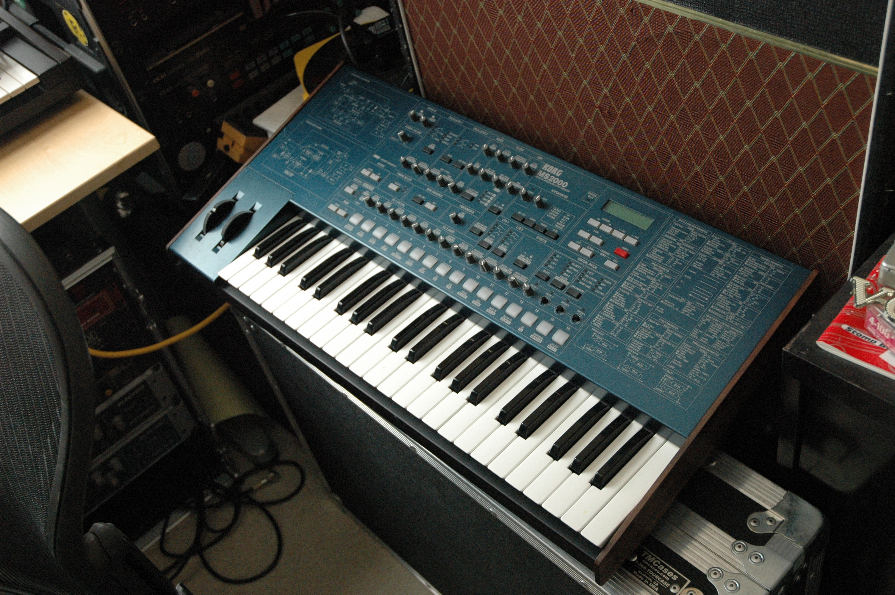 Korg MS2000 Raw. Synth. Power